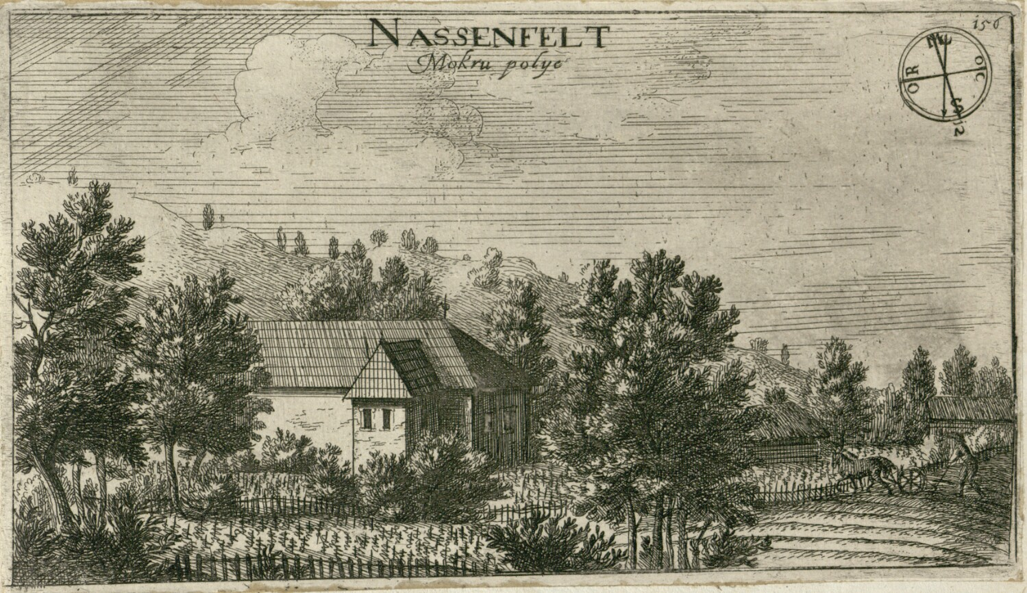 Dvorec Mokro polje